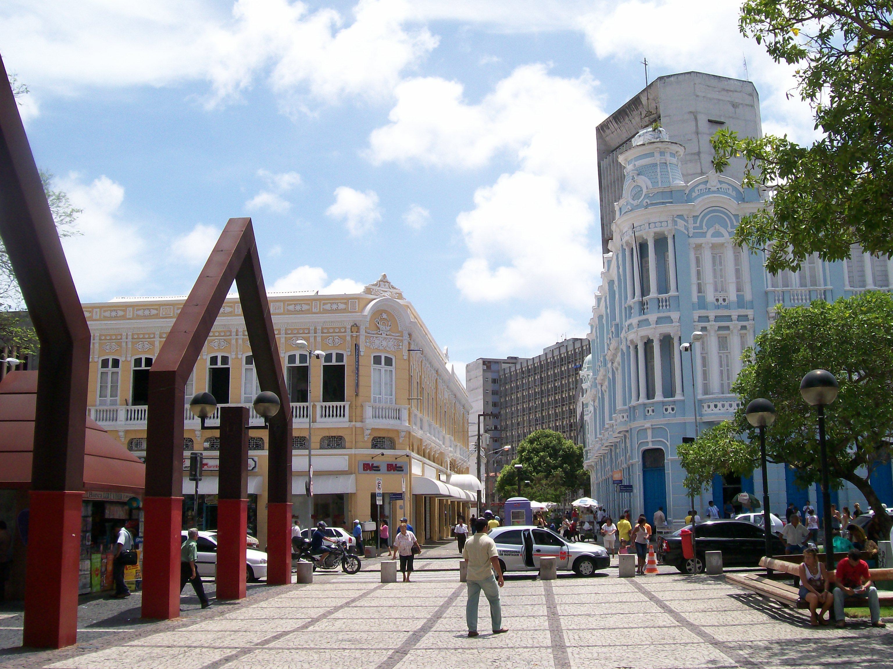 Paisagísmo de Ferro